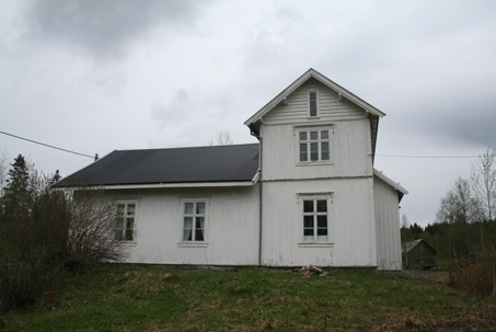 Bedehuset Betesda i Biri Øverbygd, bygget i 1894.